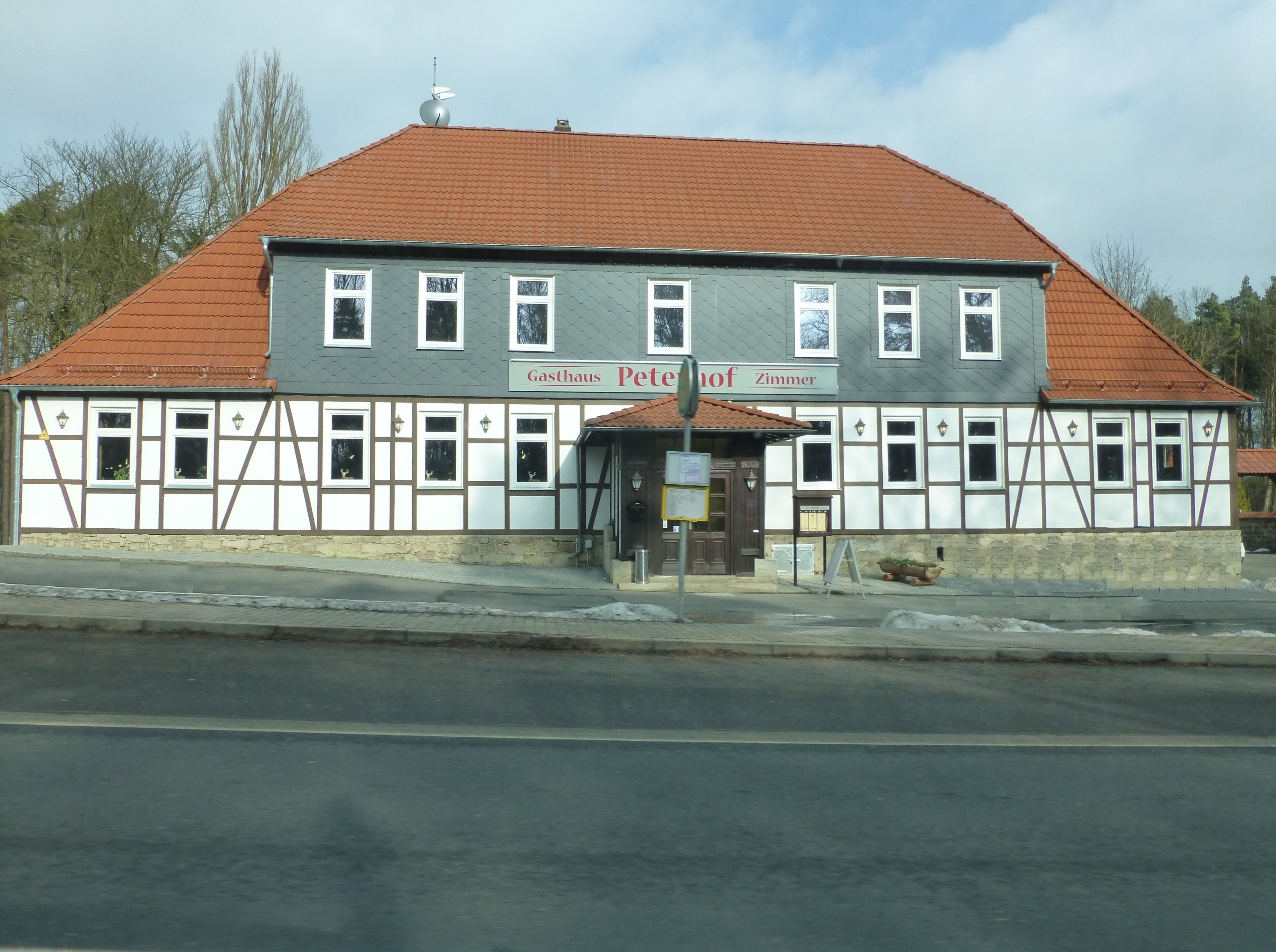 Der Peterhof an der B 249 am Rande des Hainichs